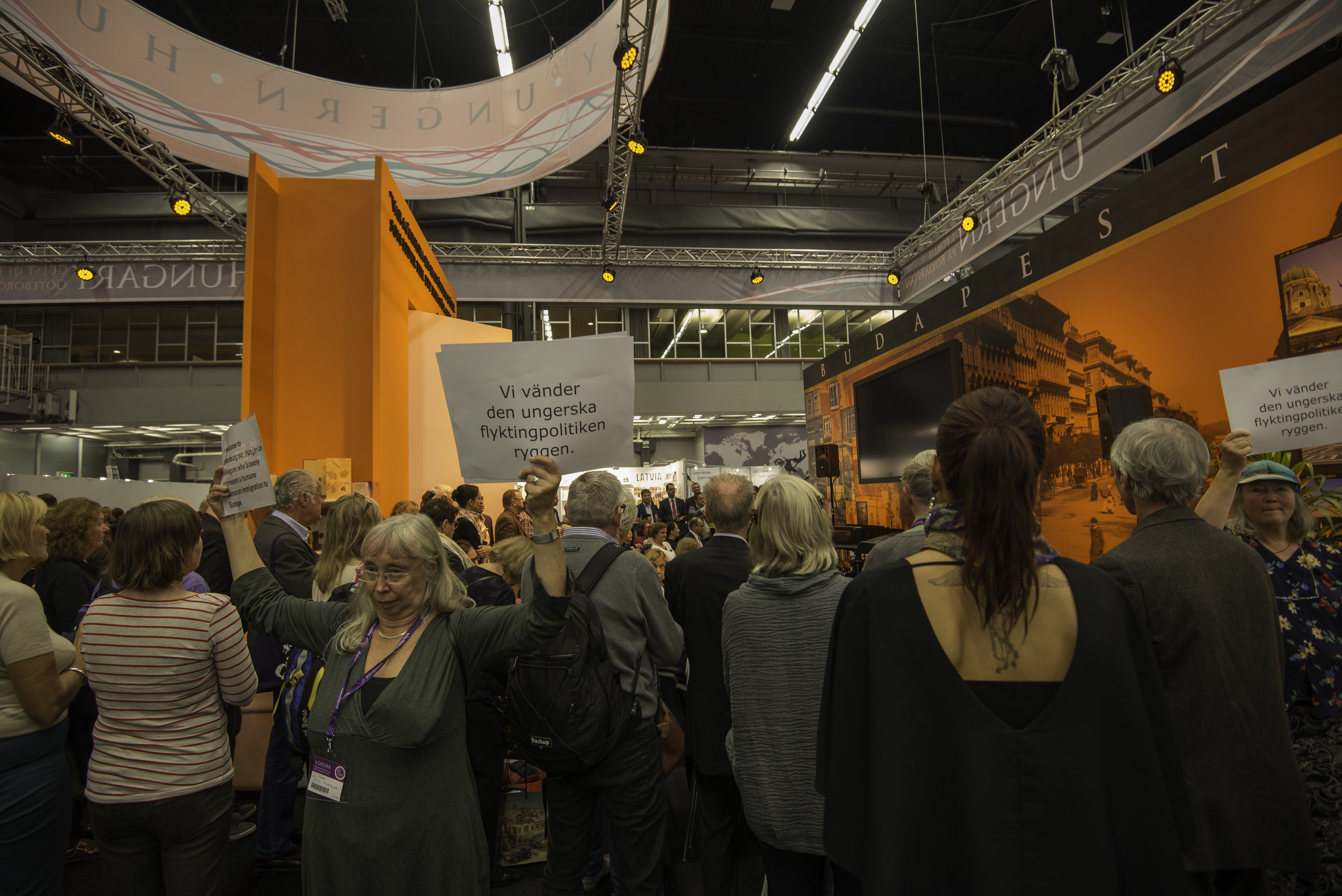 Ungerns monter på Bok- och biblioteksmässan 2015.